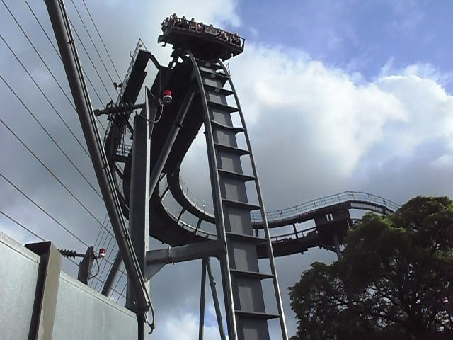 Les montagnes russes Oblivion à Alton Towers